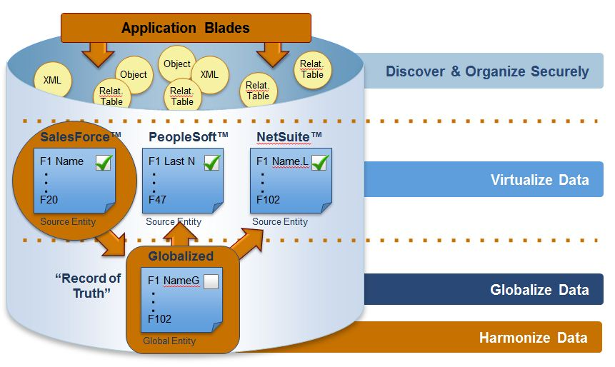 data virtualization and harmonization diagram